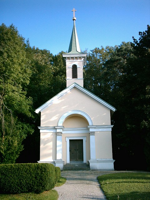 Friedhof-Kapelle in Affing